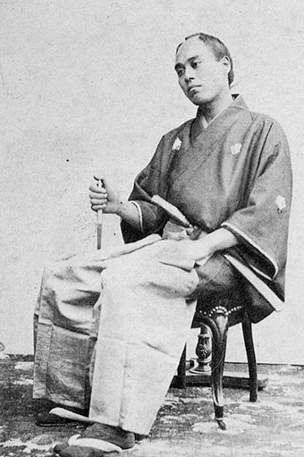 文久2年(1862)幕府使節として、ヨーロッパ歴訪の際。